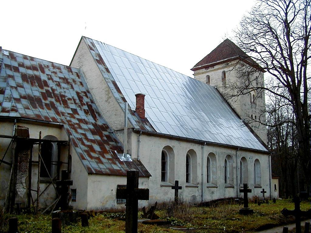 Tērvetes baznīca 2000-11-04